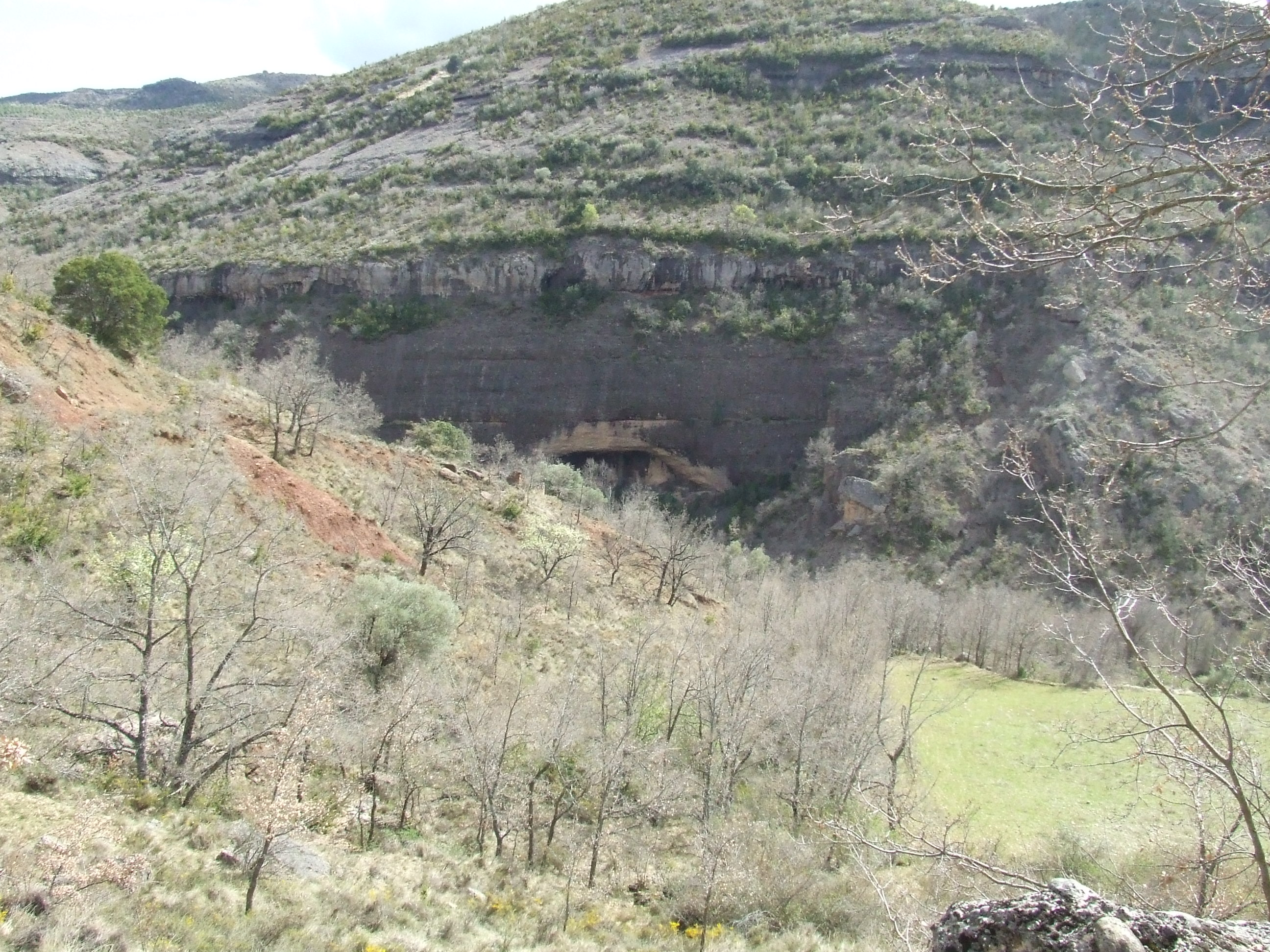 La Cova d'Urso (Esplugafreda, Sapeira, Tremp, Pallars Jussà)